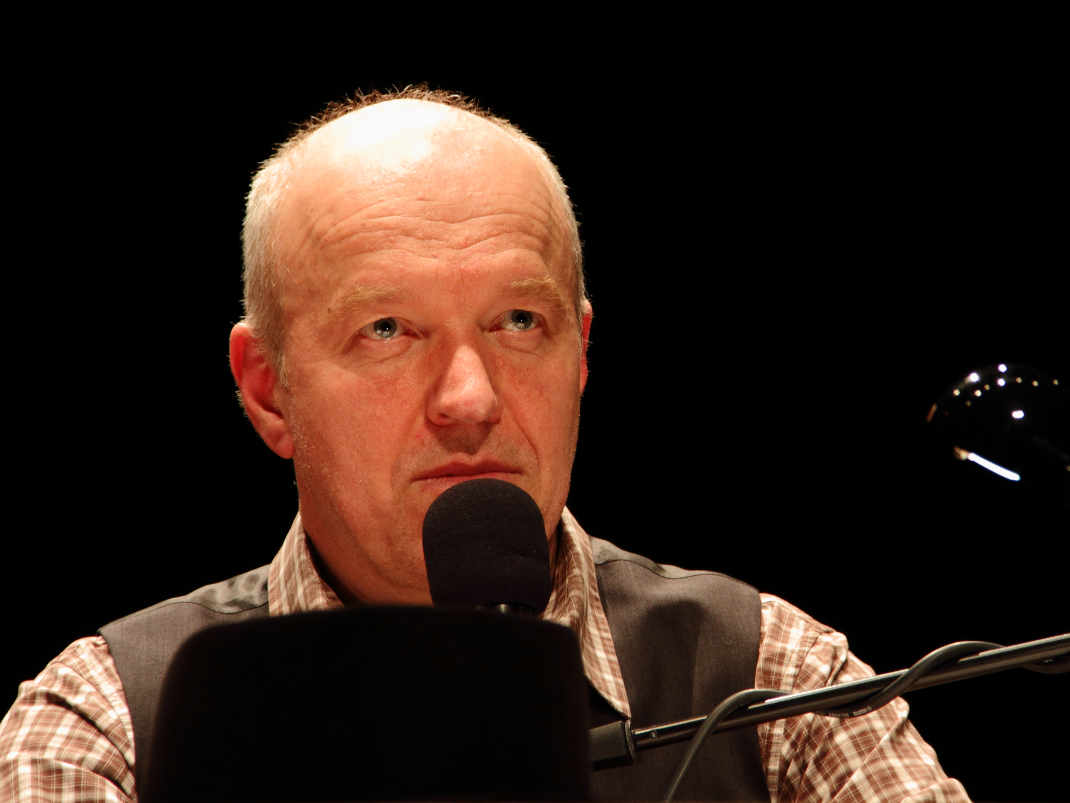 Heinz-Josef Braun in der szenischen Lesung des Romans Tannöd von Andrea Maria Schenkel in der Alten Turnhalle Niederstetten.